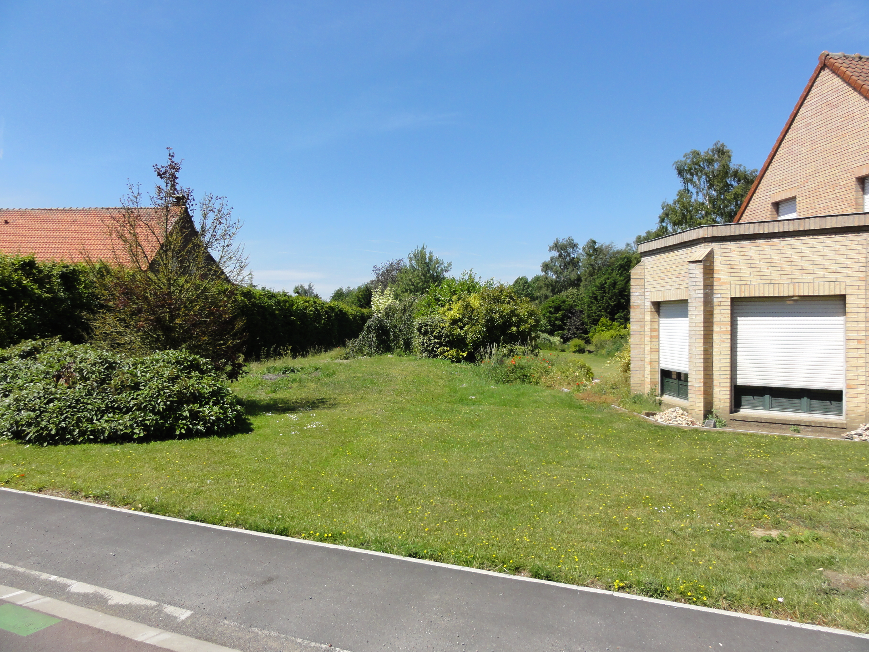 Terril n° 242 dit Cavalier Voie Fosse Dechy, Fosse Dechy de la Compagnie des mines d'Aniche, Lewarde, Guesnain et Dechy, Nord, Nord-Pas-de-Calais, France.